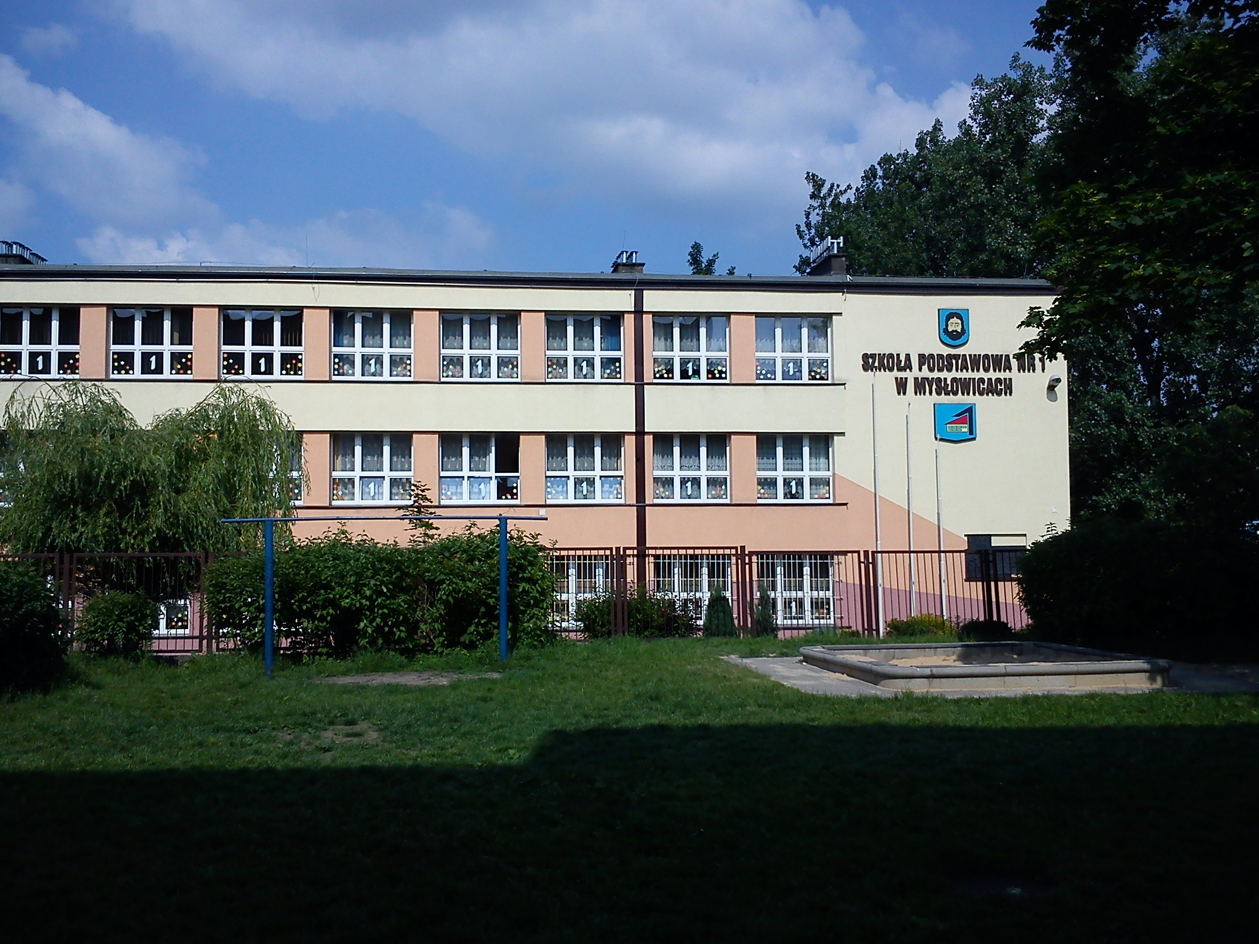 Mysłowice-Szkoła Podstawowa nr1.